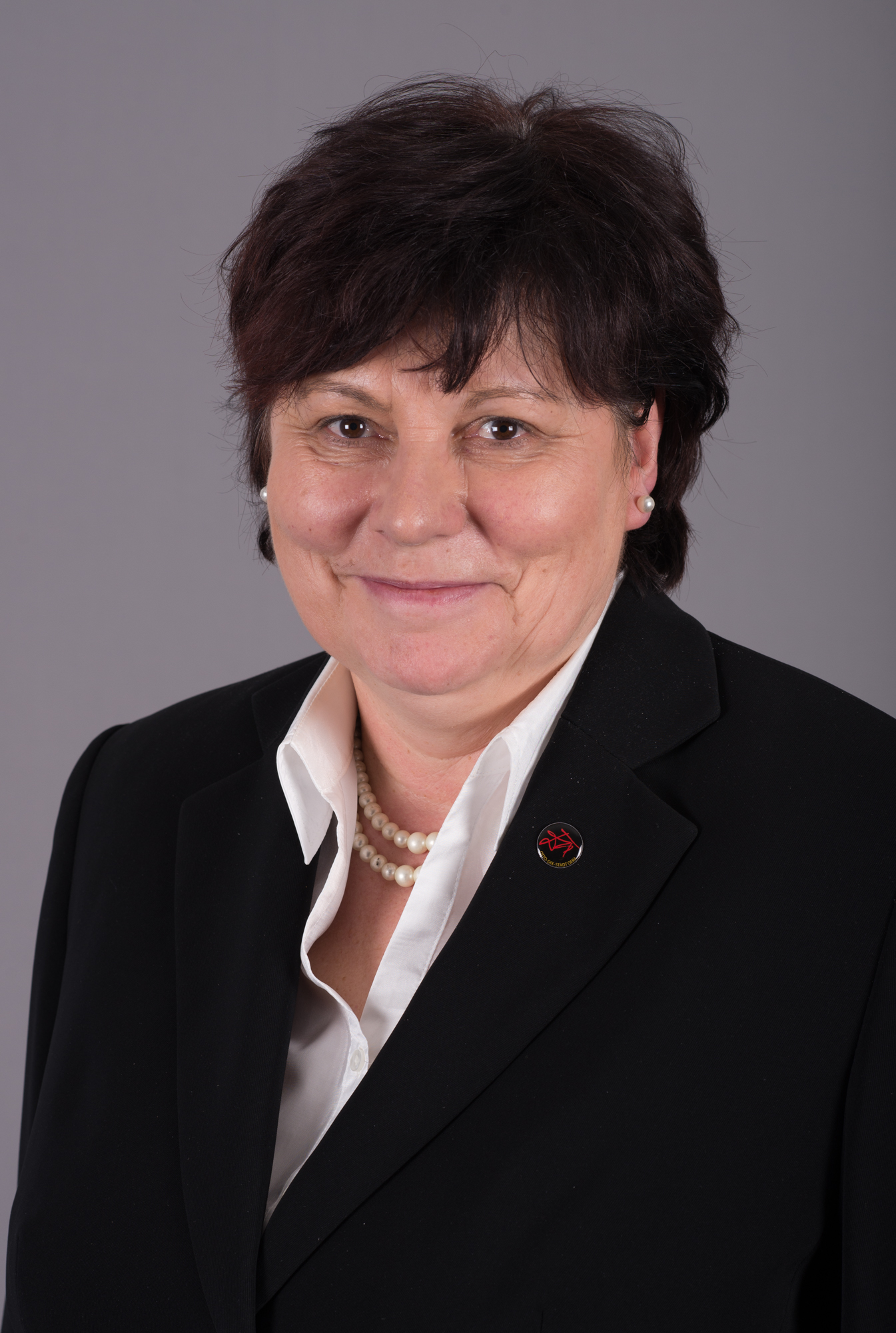 Landtagsprojekt im Thüringer Landtag